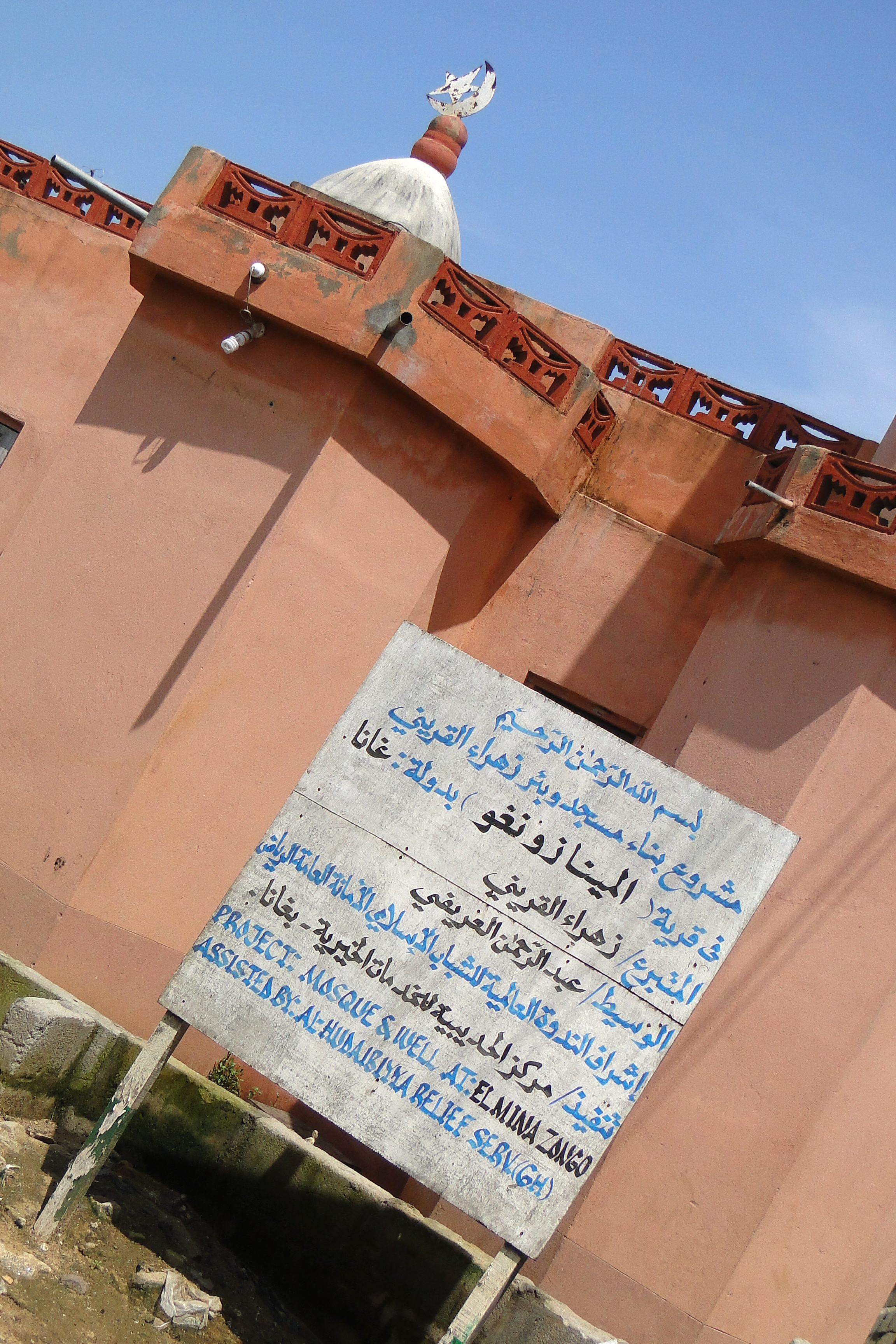 Mosque and Arabic Sign - Elmina - Ghana